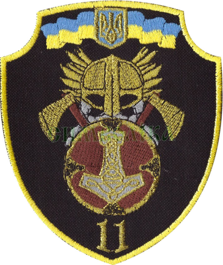 Нарукавний знак, 11 окремий моторизований піхотний батальйон